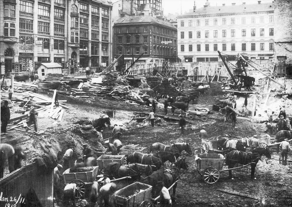 Hamngatan i Stockholm den 26 november 1913, byggarbeten för varuhuset Nordiska Kompaniet (NK) har just börjat. Sidenhuset,_Stockholm och Telefontornet syns i bakgrunden.